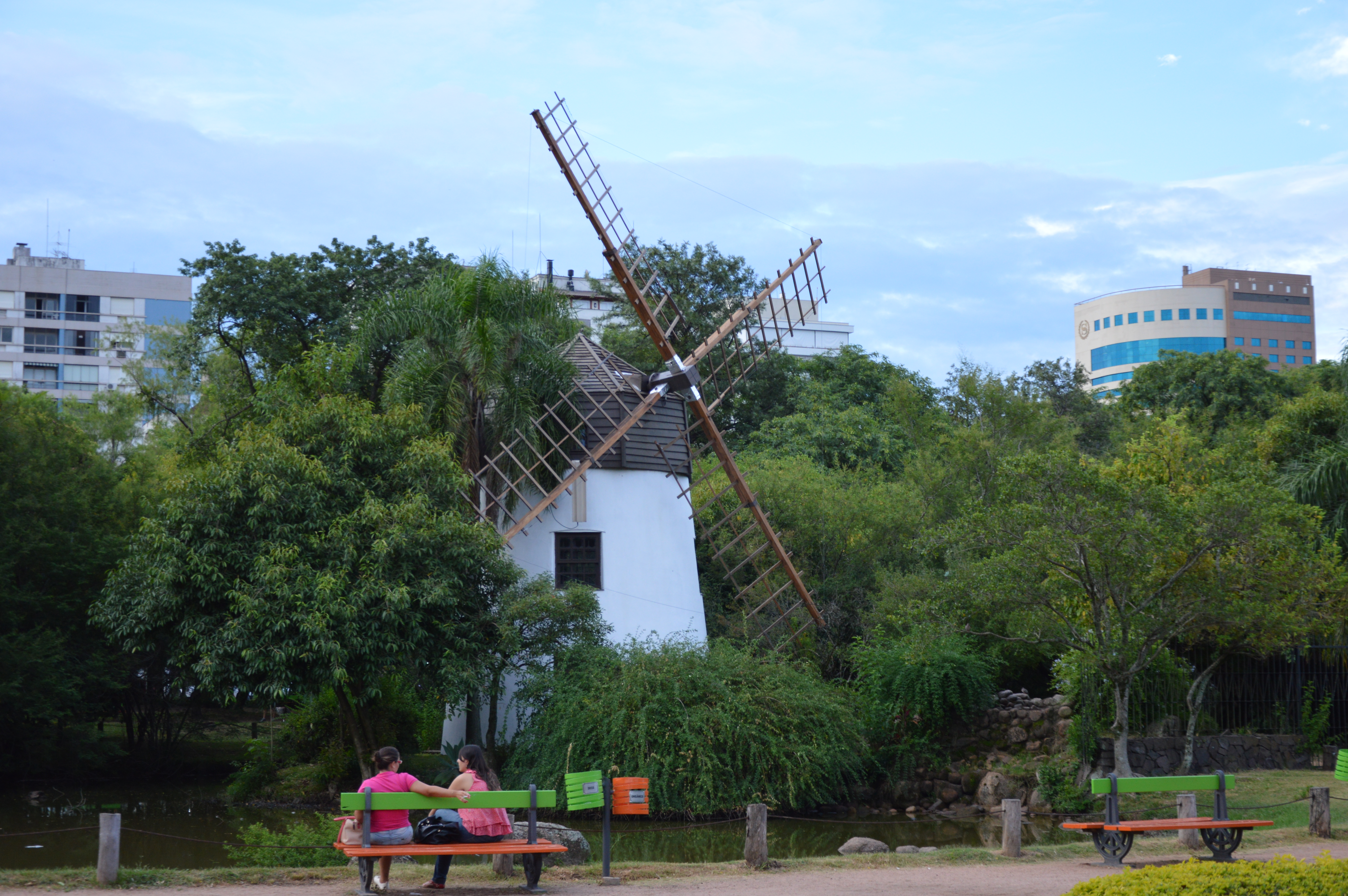 Moinho açoriano no Parque Moinhos de Vento em Porto Alegre